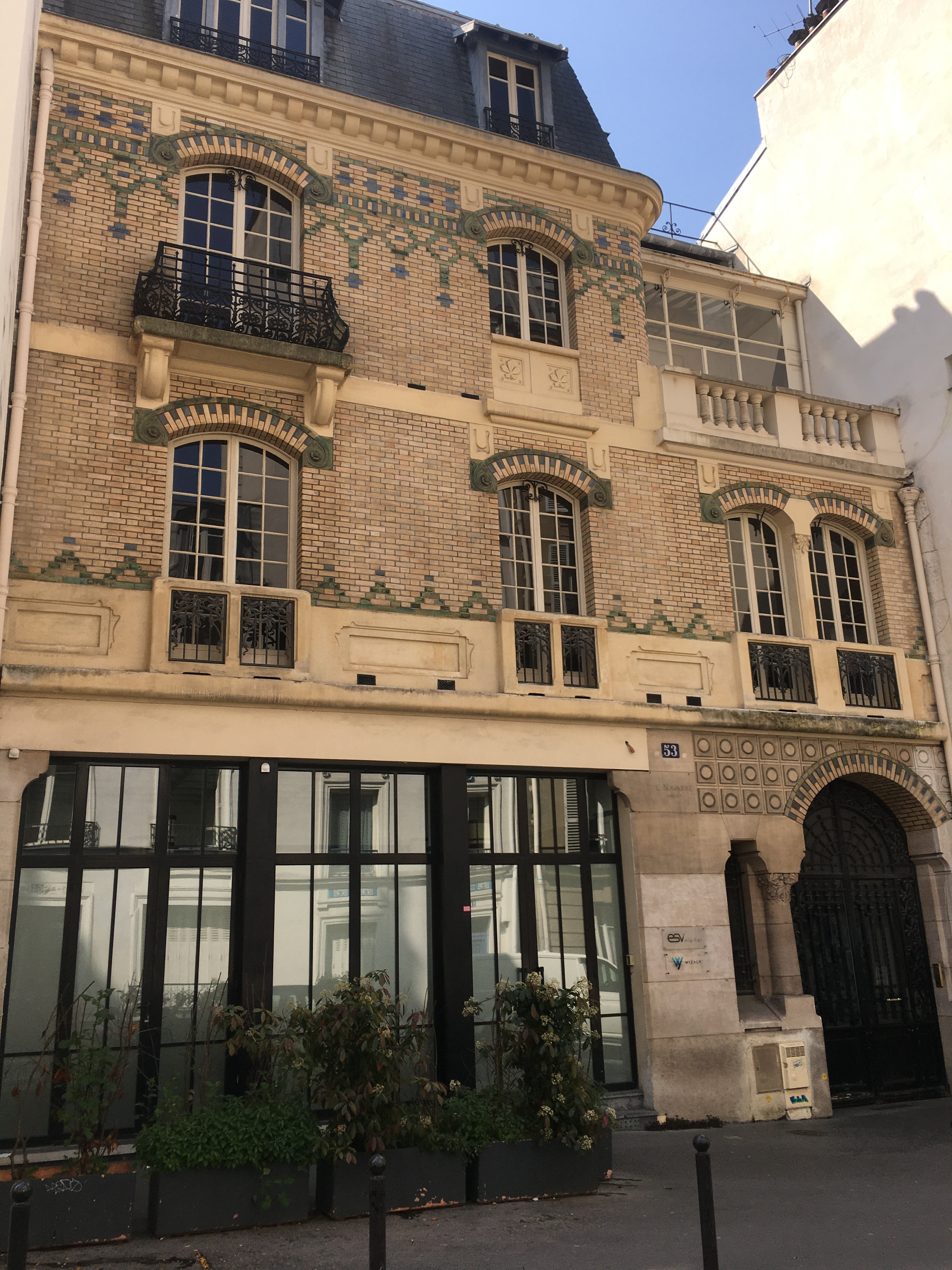 Immeuble de 1920 Paris 53 rue Nollet architecte Jean-Alexandre Navarre avec le concours du céramiste Alexandre Bigot